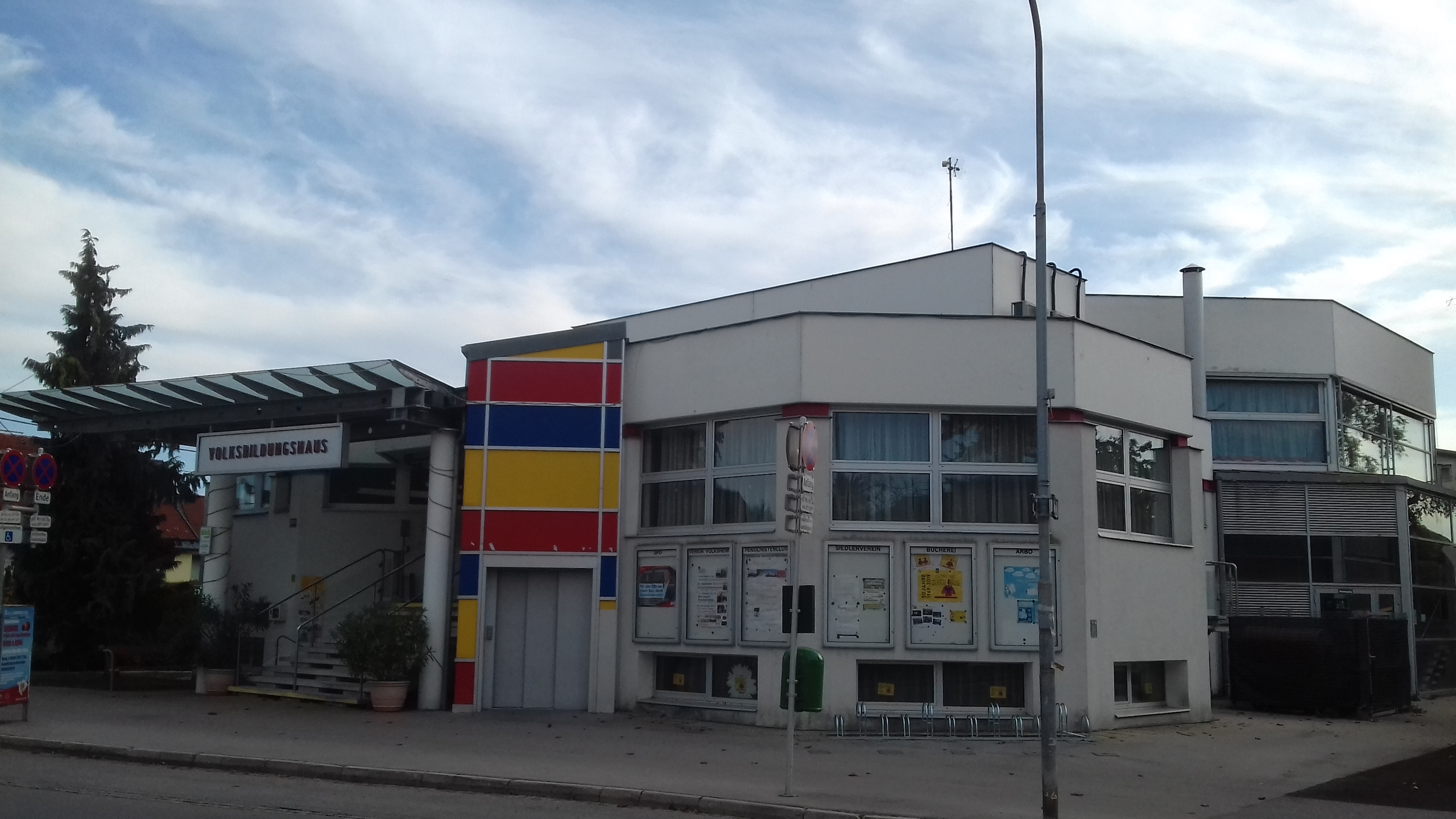 Volksbildungsheim Oberlisse